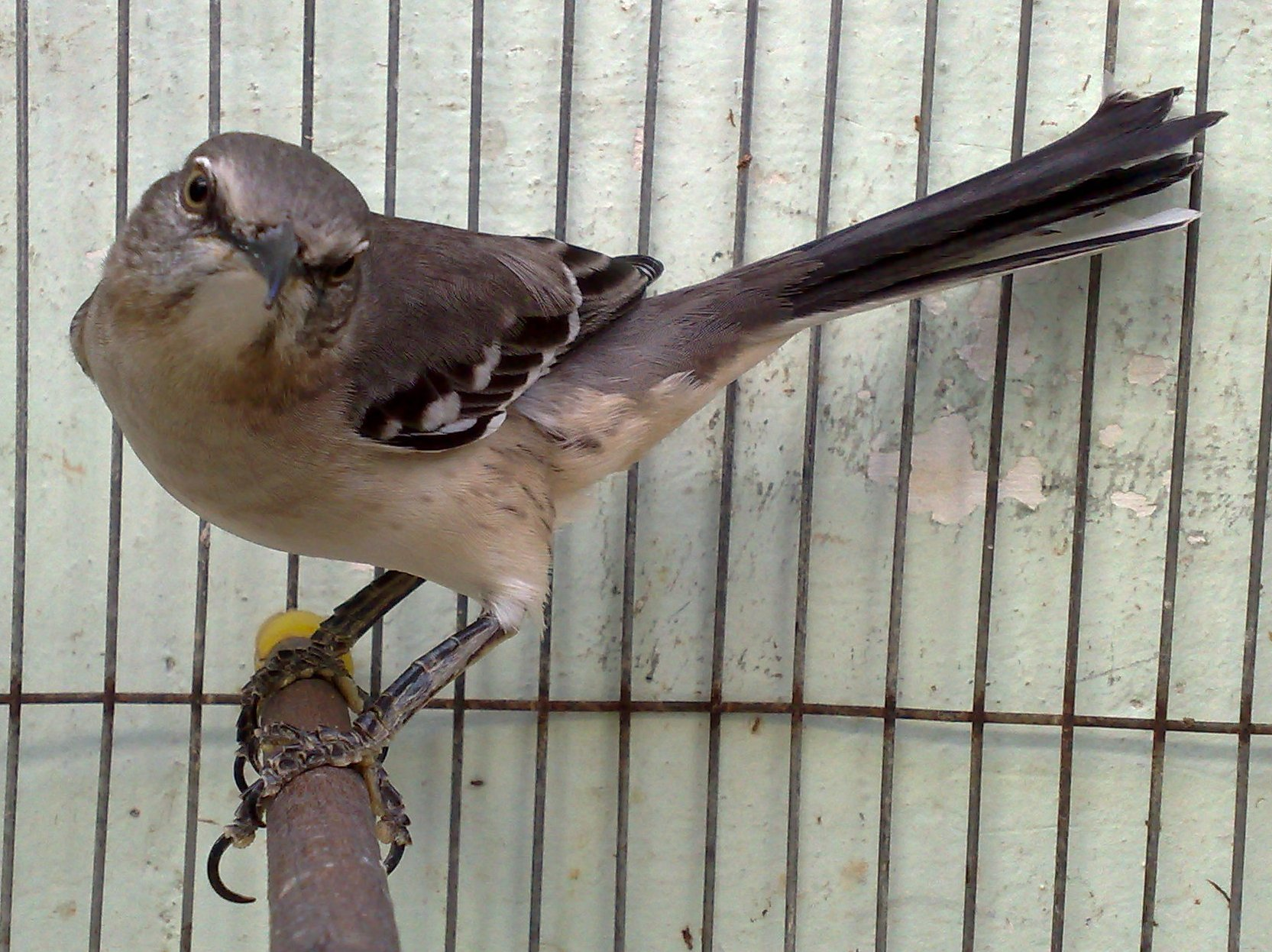 Sinsonte en cautiverio. La Habana, Cuba.